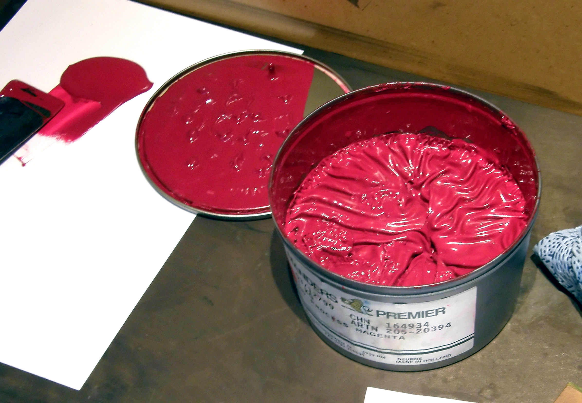 MAG.